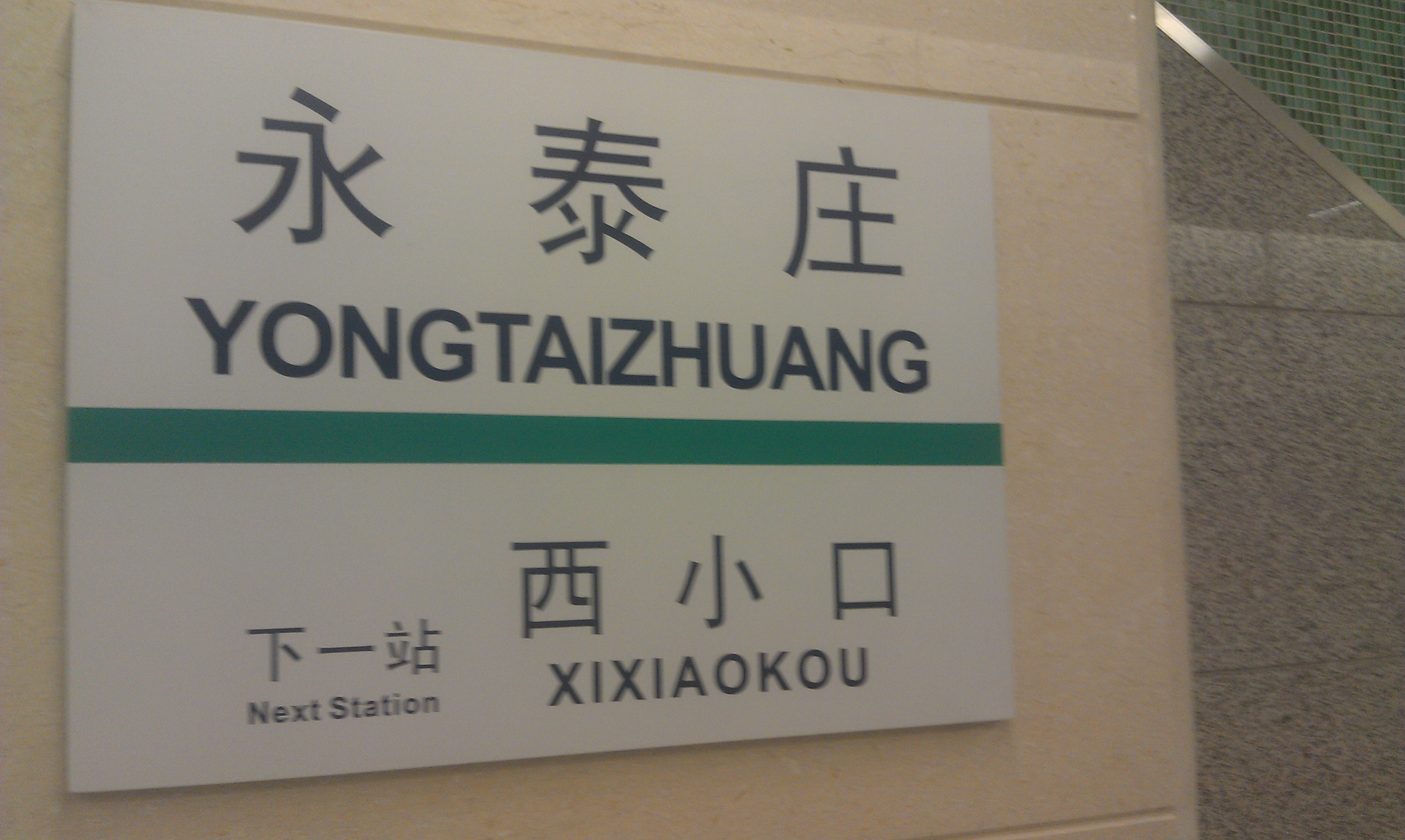 北京地铁永泰庄站指示牌